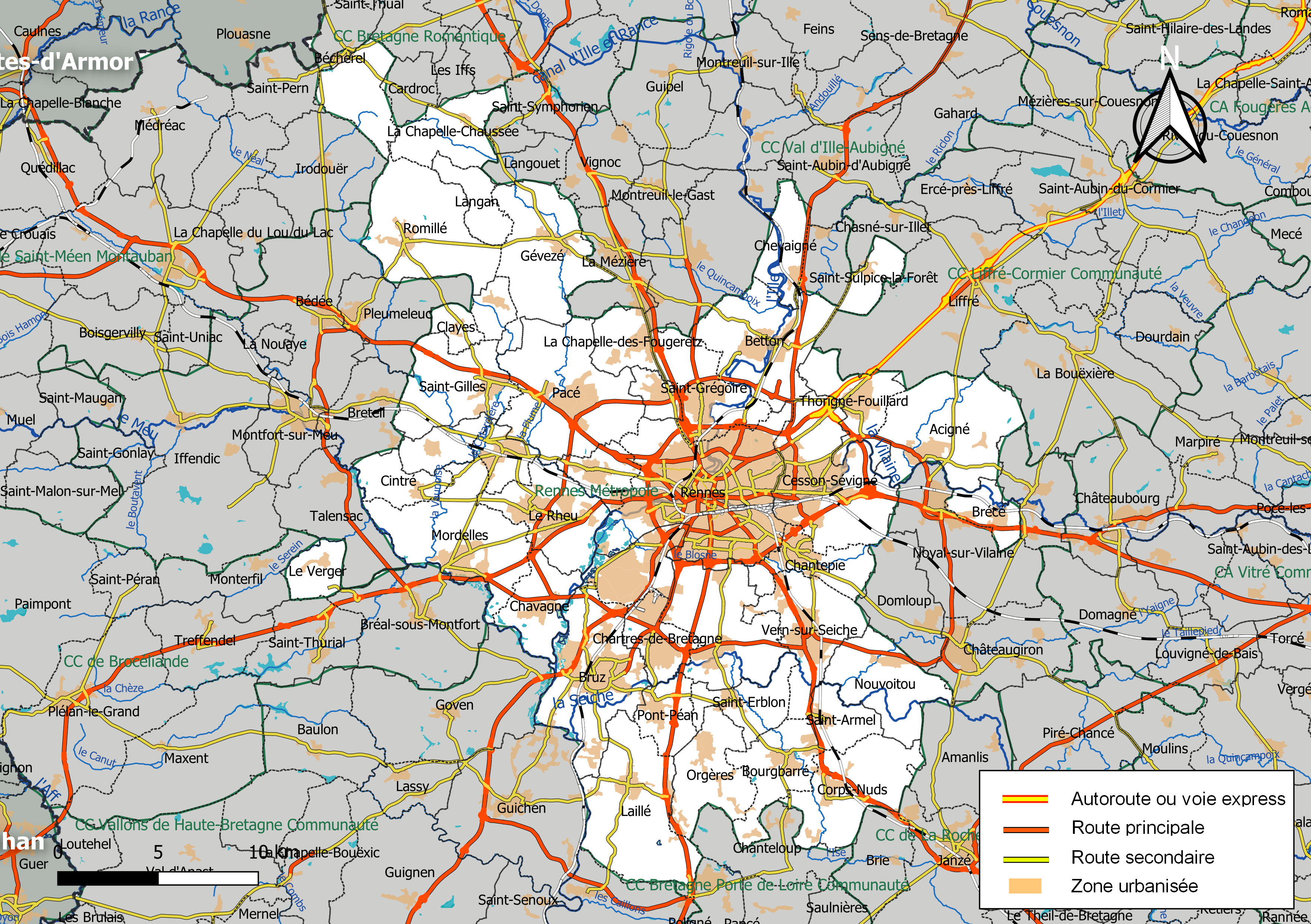 Carte géographique de l'intercommunalité Rennes Métropole, département d'Ille-et-Vilaine, France. Composition au 1er janvier 2019.